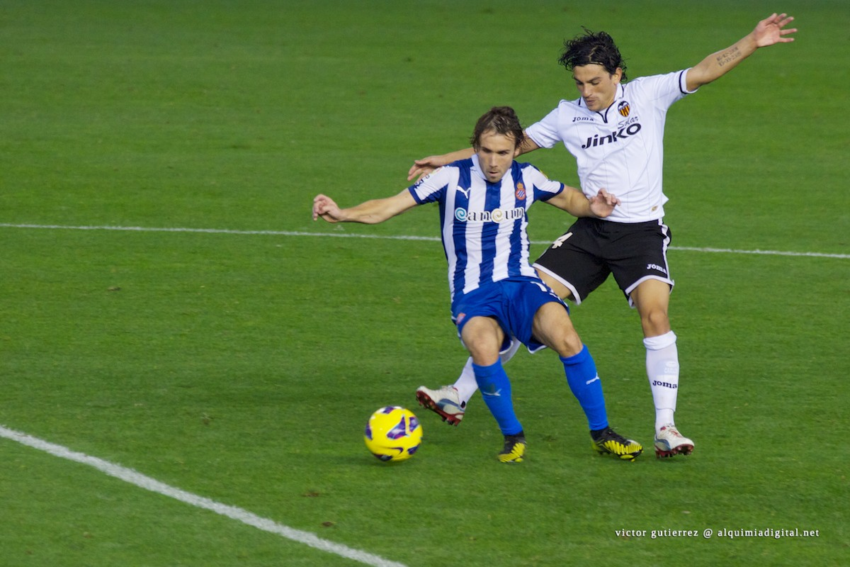 Valencia CF - Español 2012 .